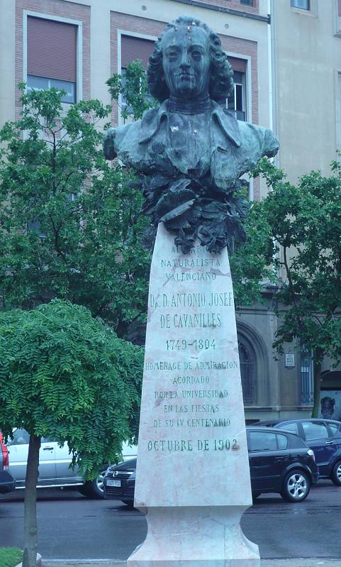 Botánico Cavanilles en el paseo de la Alameda de Valencia.